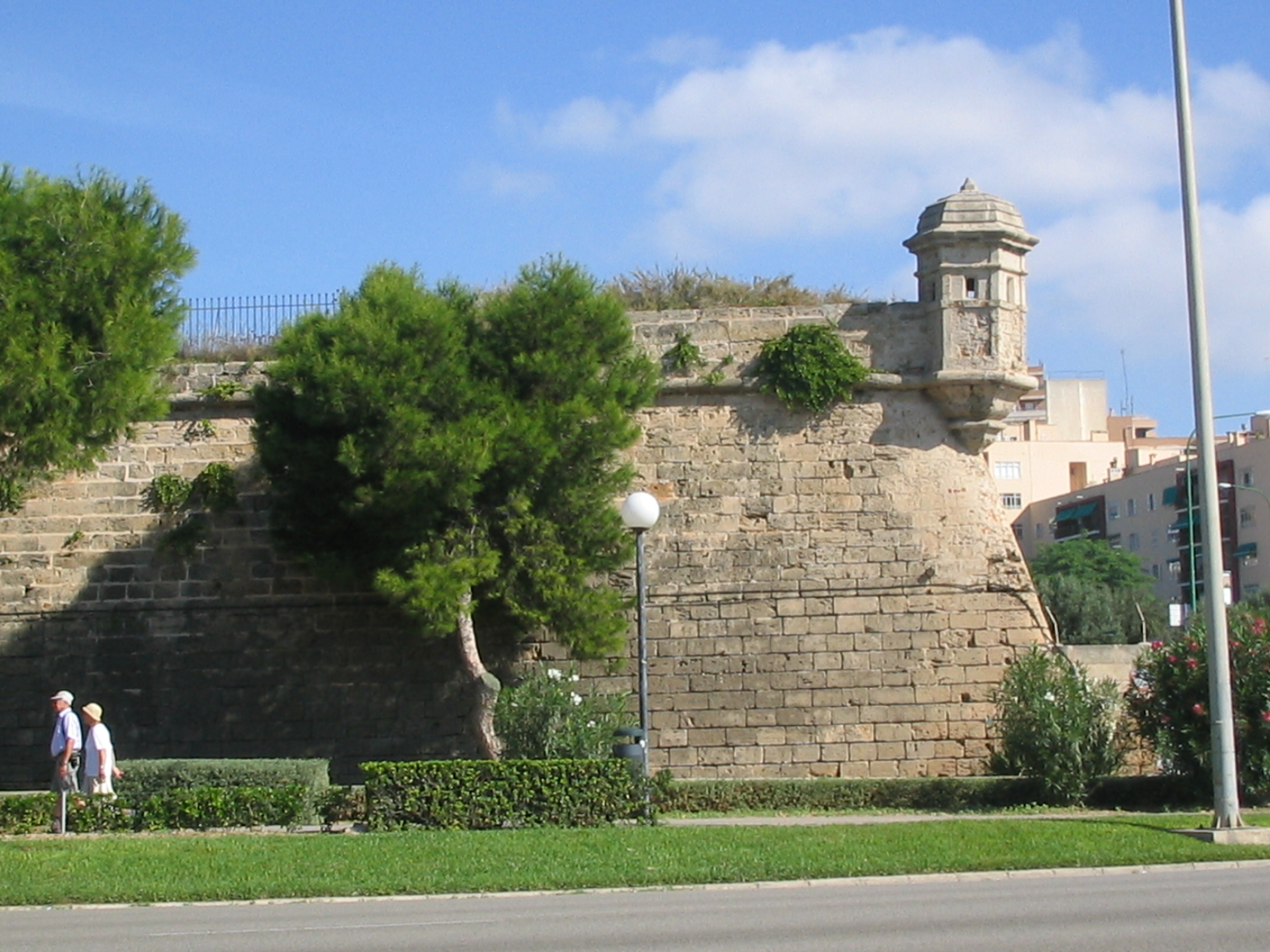 Antigua muralla de Palma de Mallorca